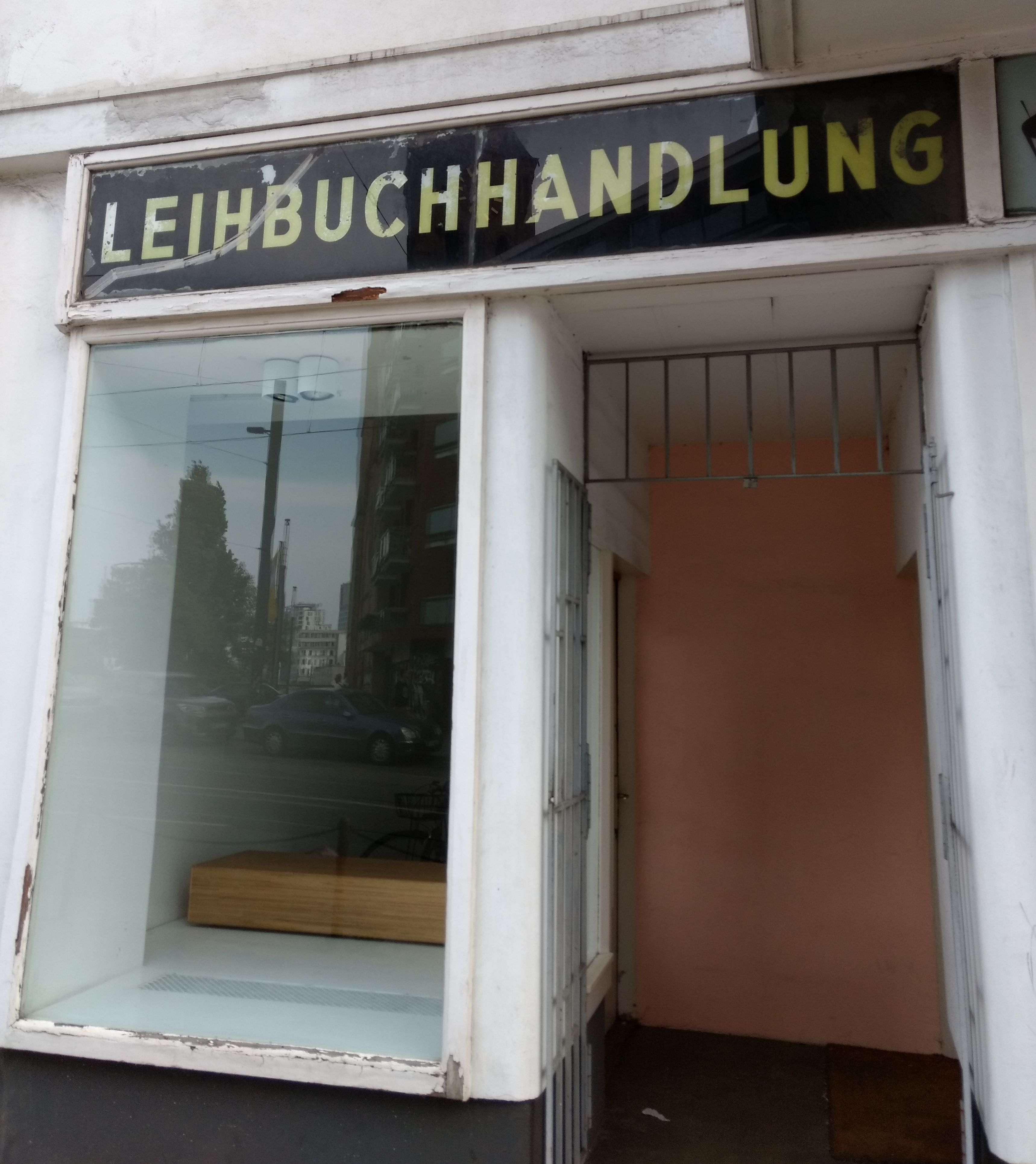 Schild einer Leihbuchhandlung, evtl. nach Sekundärverwendung. Ackerstraße 39, Düsseldorf